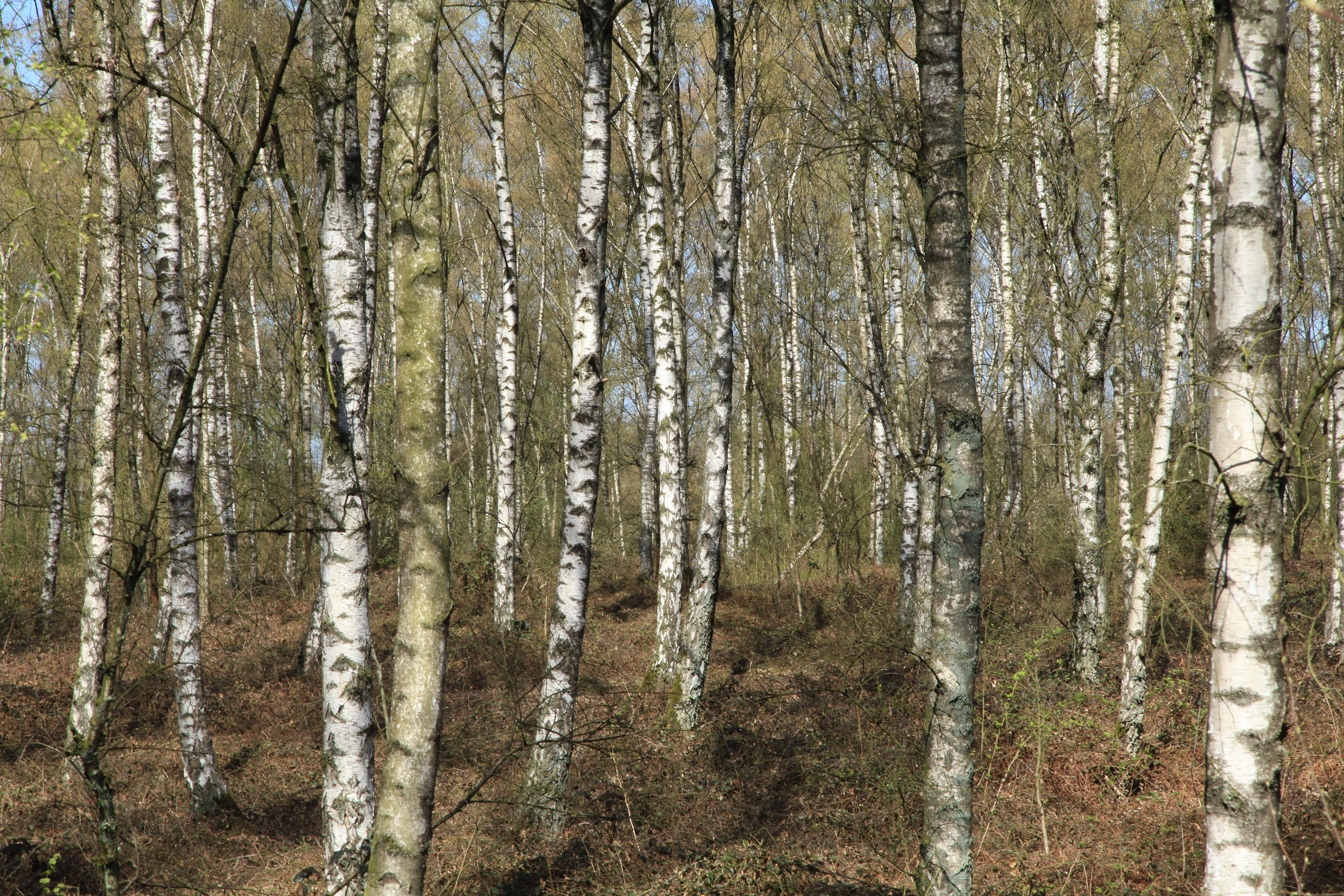 Halde Rheinbaben in Gladbeck an der Industriestraße in Bottrop